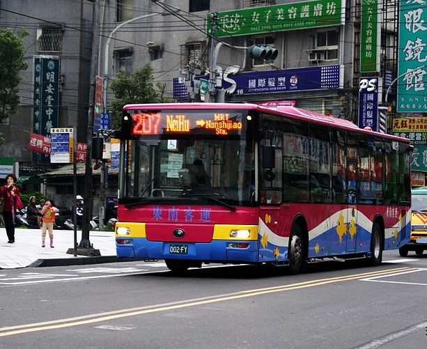 東南客運2012年領牌之宇通ZK6128HG低地板公車002-FY行駛臺北市聯營公車207線。